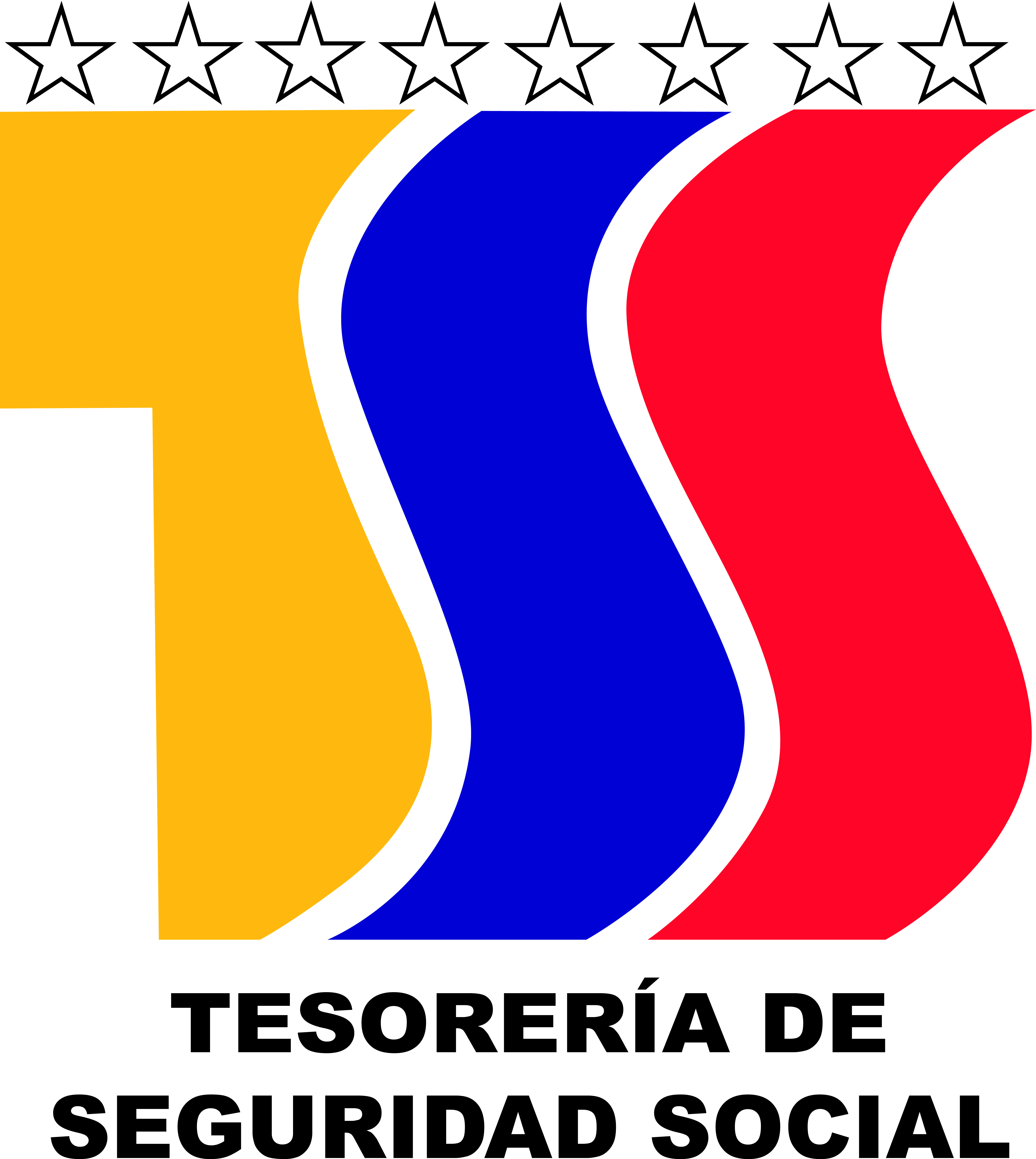 Logo nuevo con los colores de la Bandera